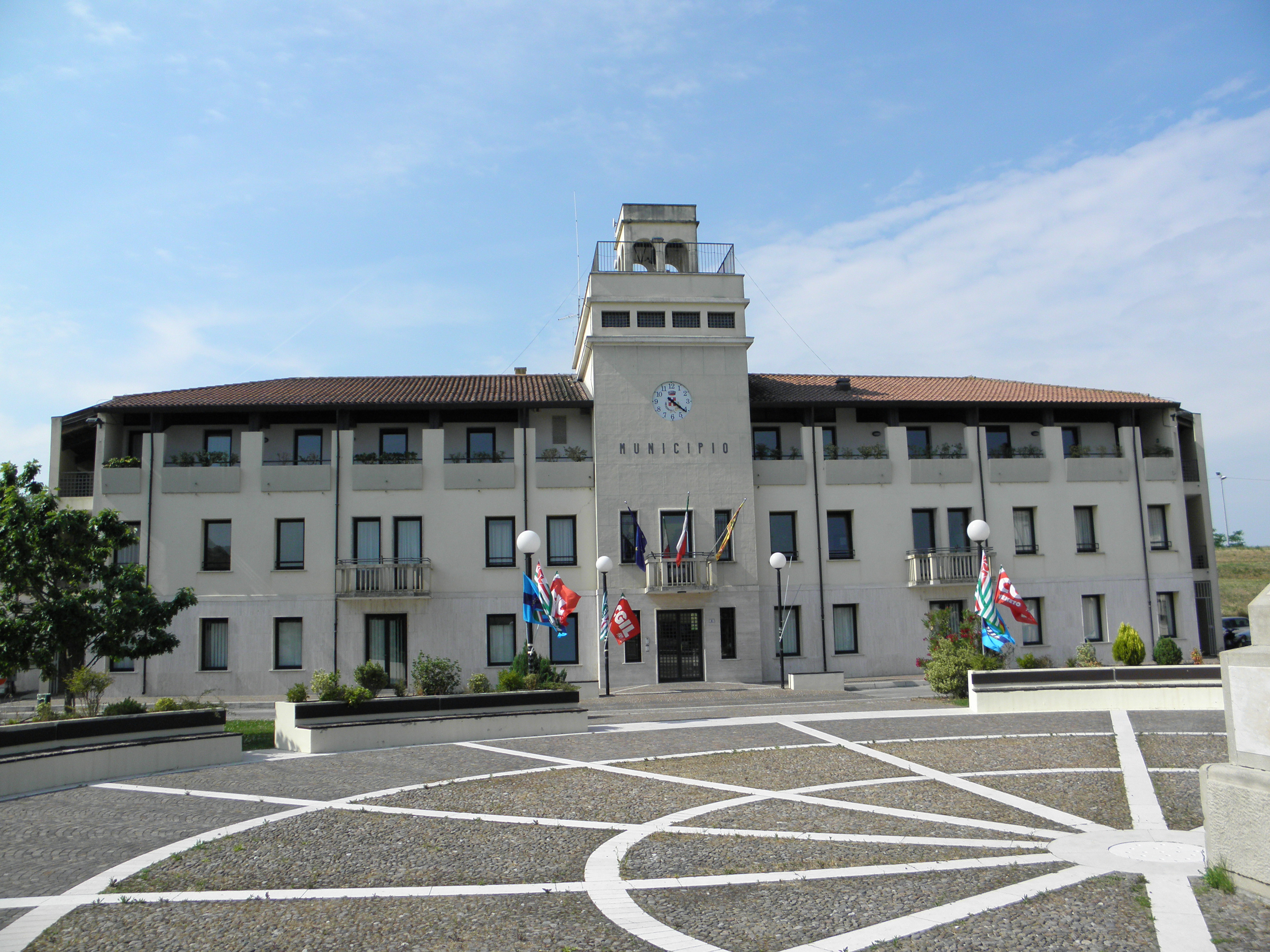 Ca' Tiepolo, frazione e sede comunale di Porto Tolle: l'caserma austriaca ora sede del municipio.